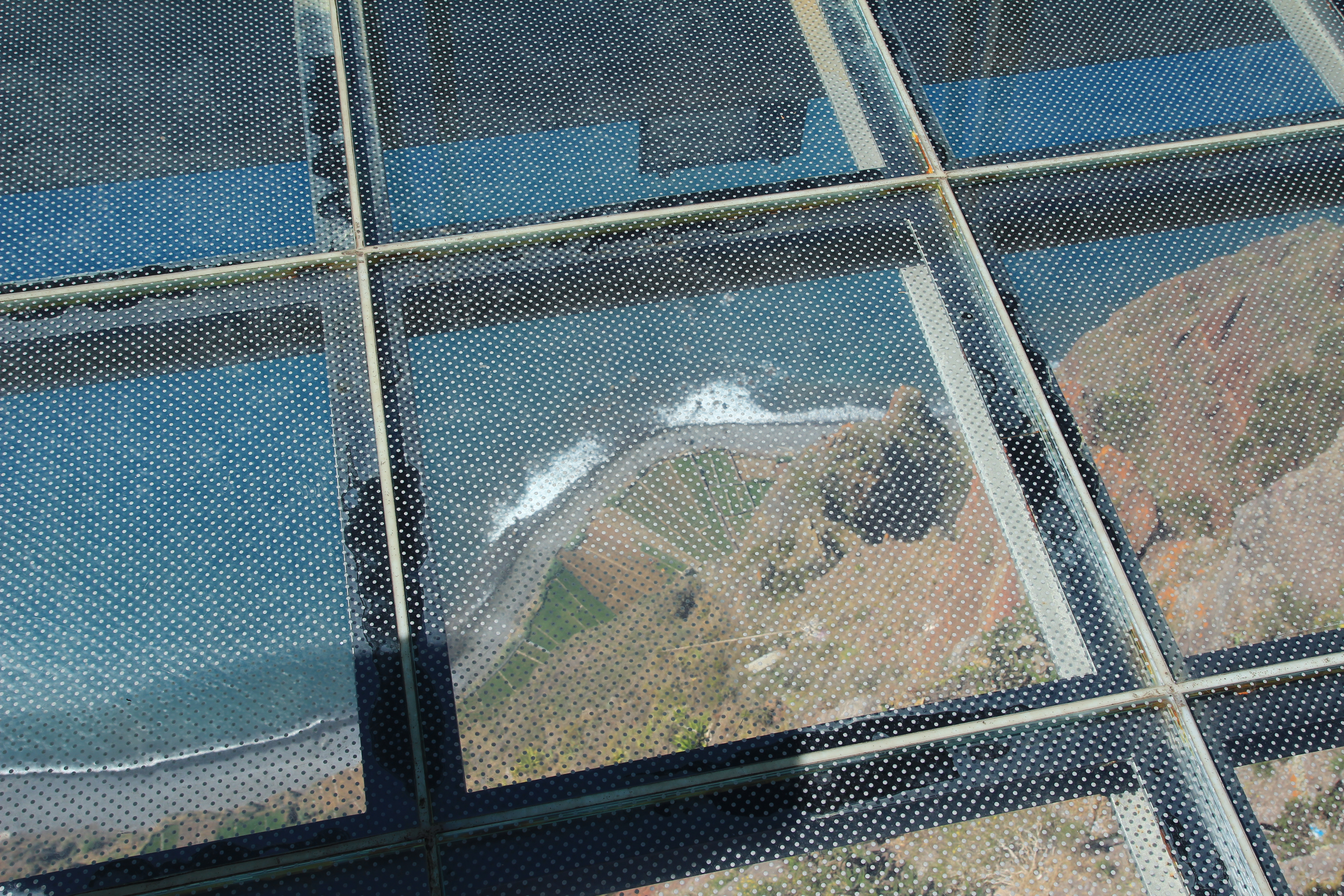 Blick durch den Glasboden den Skywalks runter auf die Felder